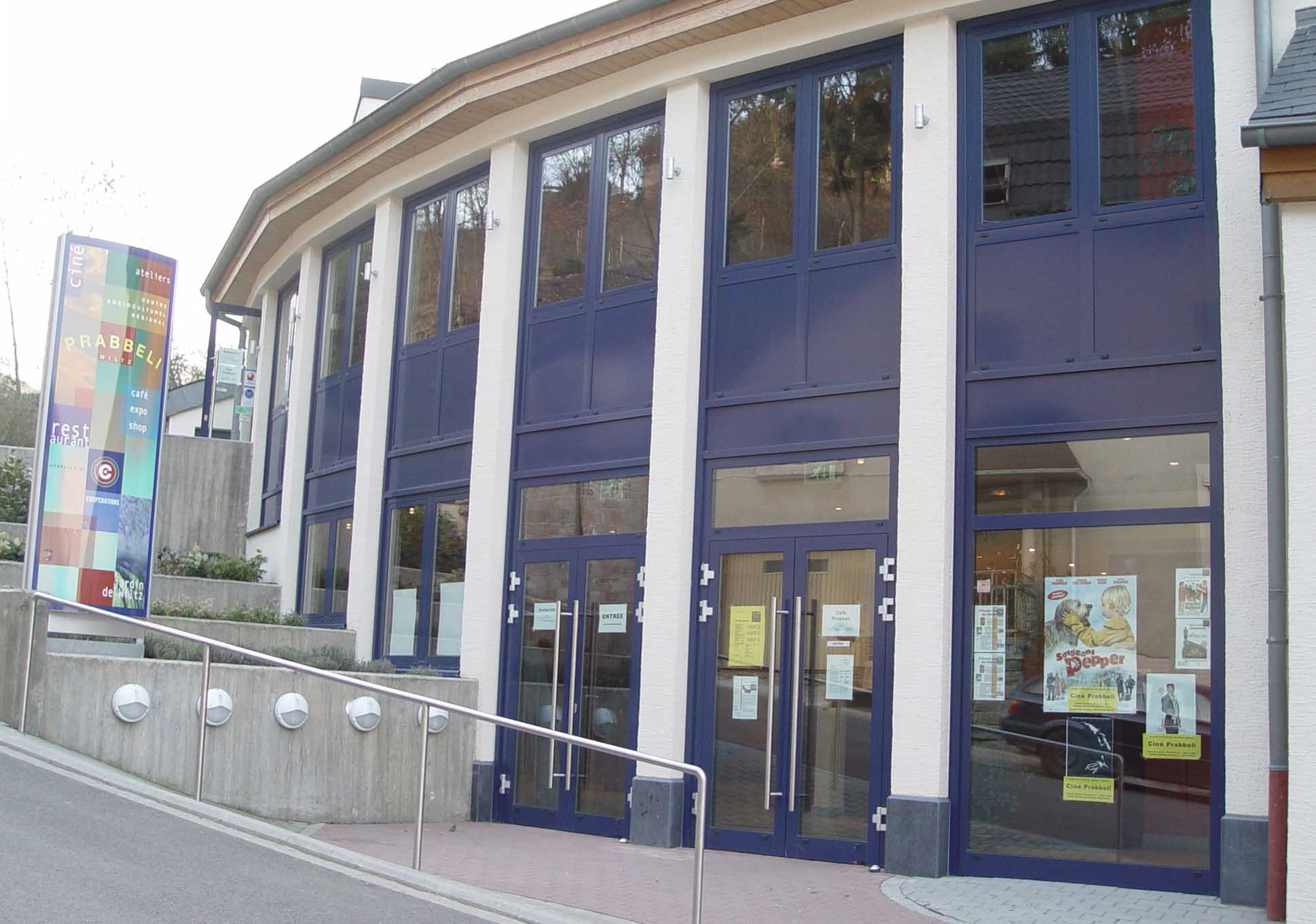 Kino Prabbeli.